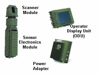 joint service area chemical detector, Artemis